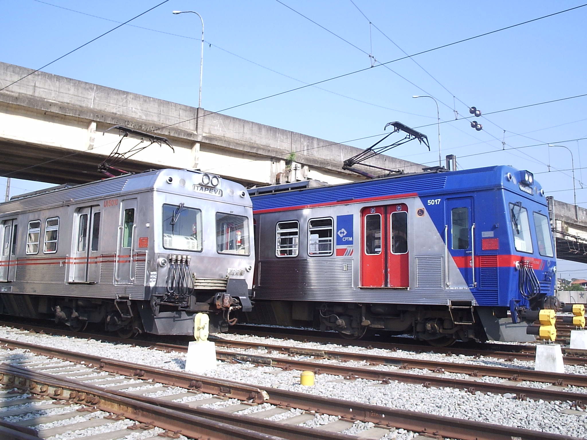 Trem 5000 - Linha B - CPTM